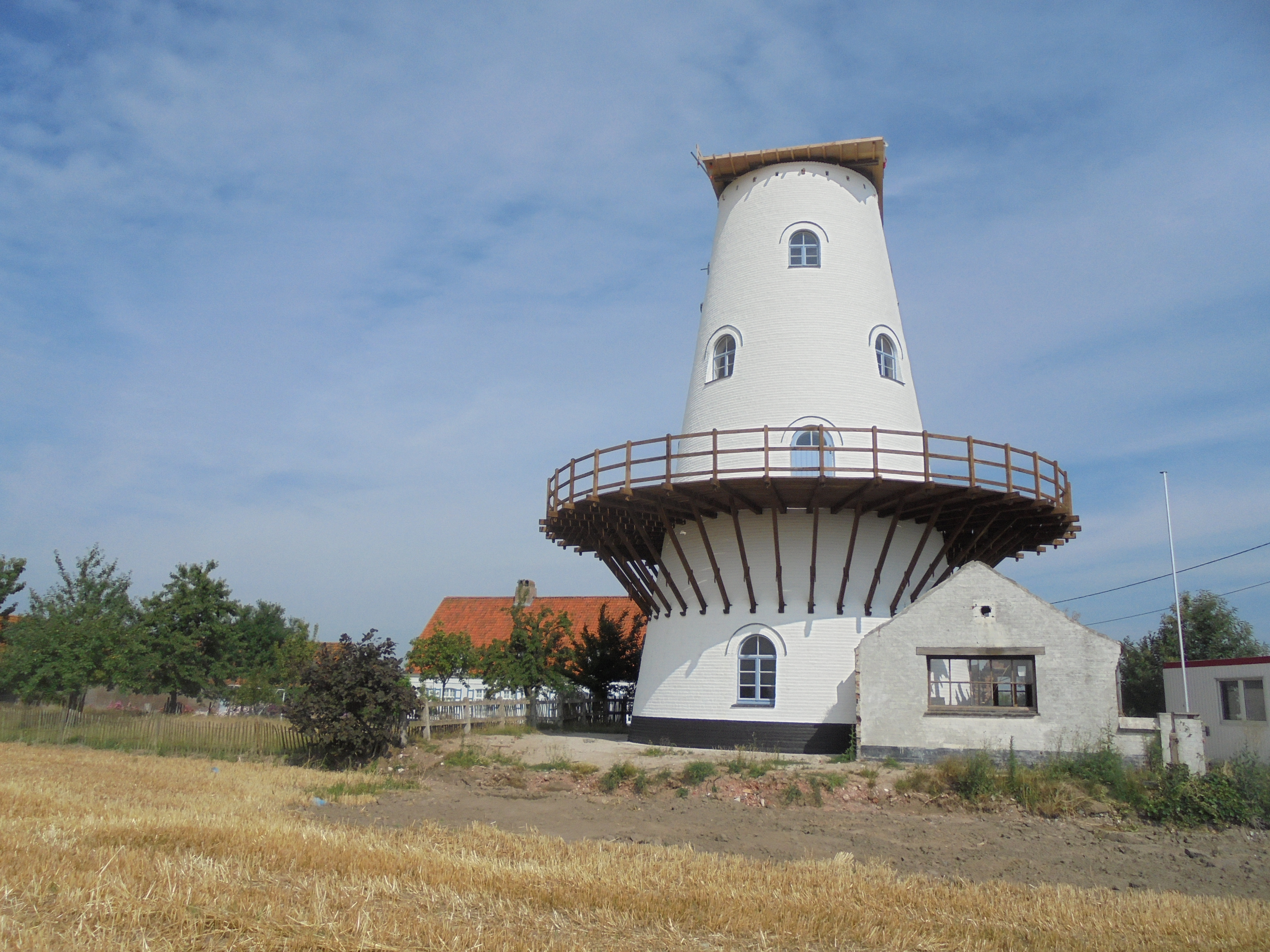 Mevrouwmolen - Mevrouwmolenstraat - Kanegem - Tielt - West-Vlaanderen - België